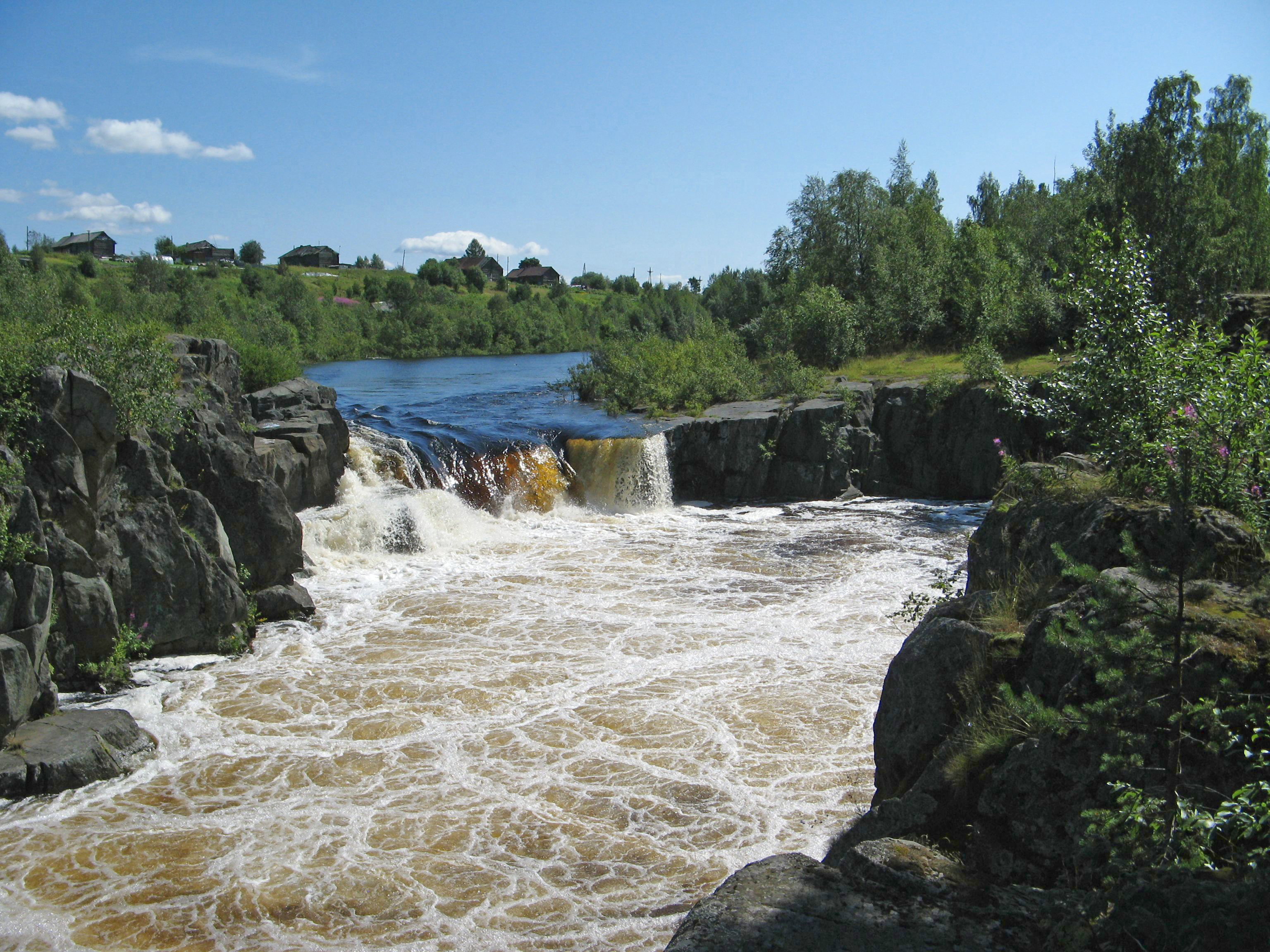 Водопад Воицкий падун